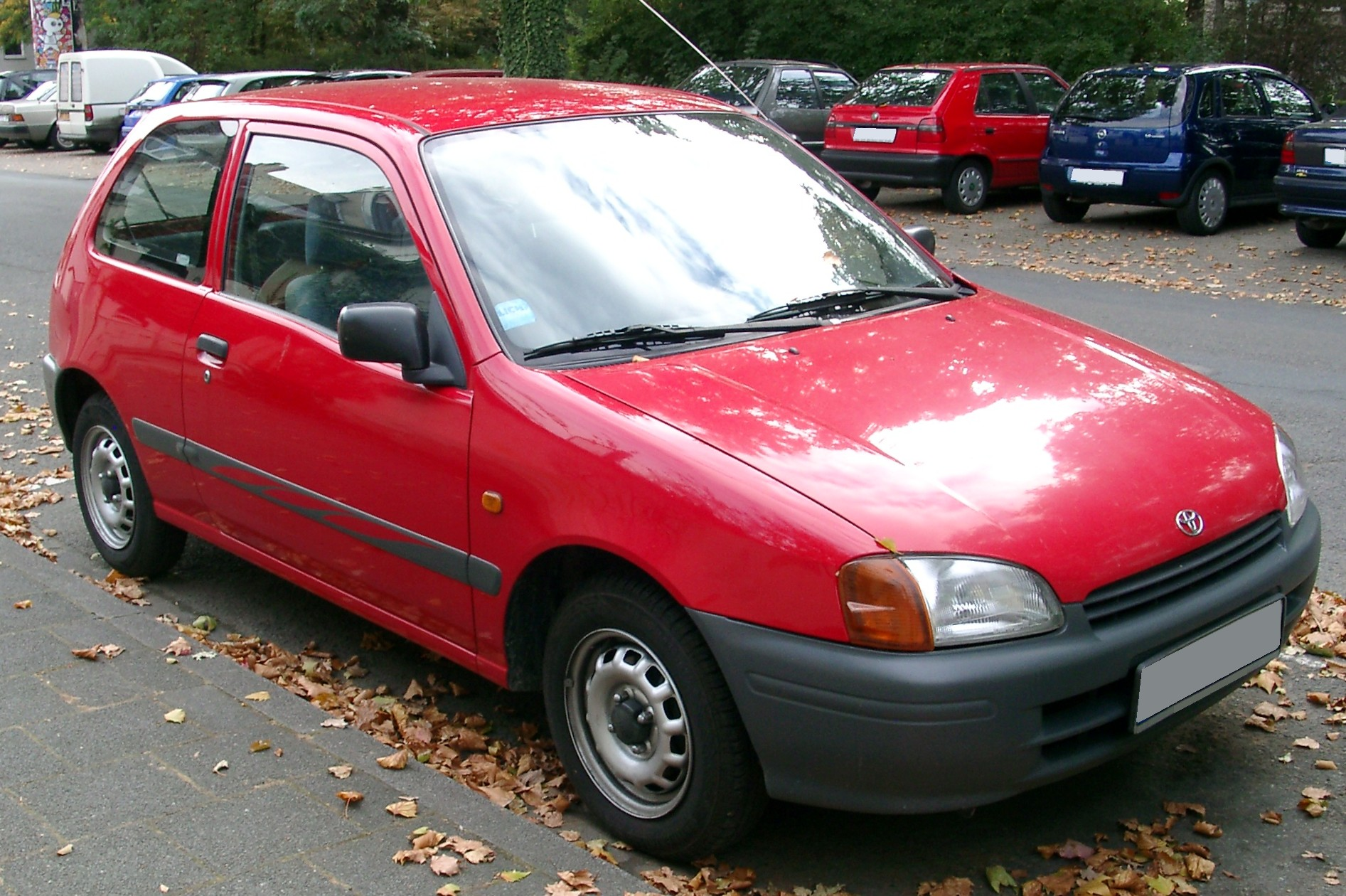 Toyota Starlet P9 (1996-1999)